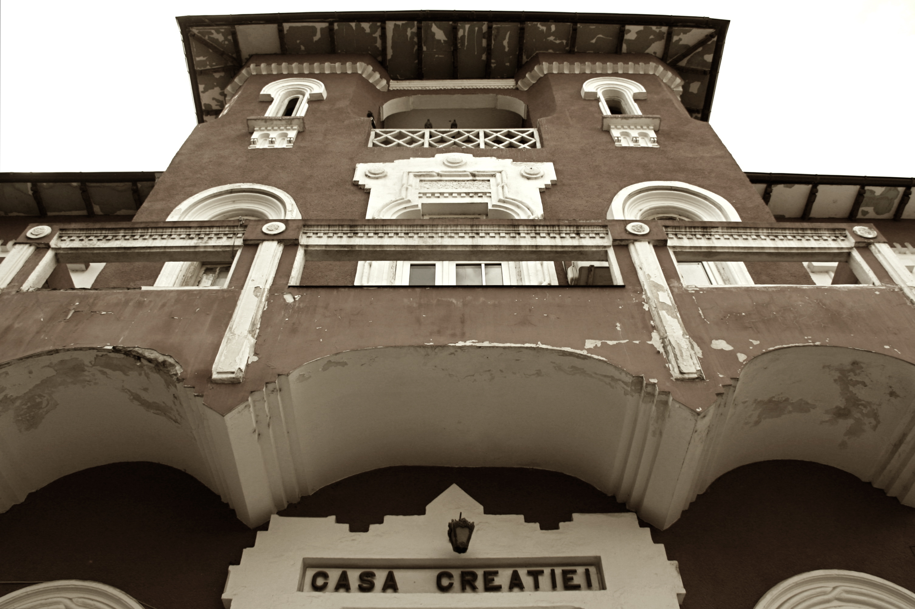 Casã cunoscutã sub denumirea de Policlinicã, str. Argeș 60-62, municipiul Oltenița, România.